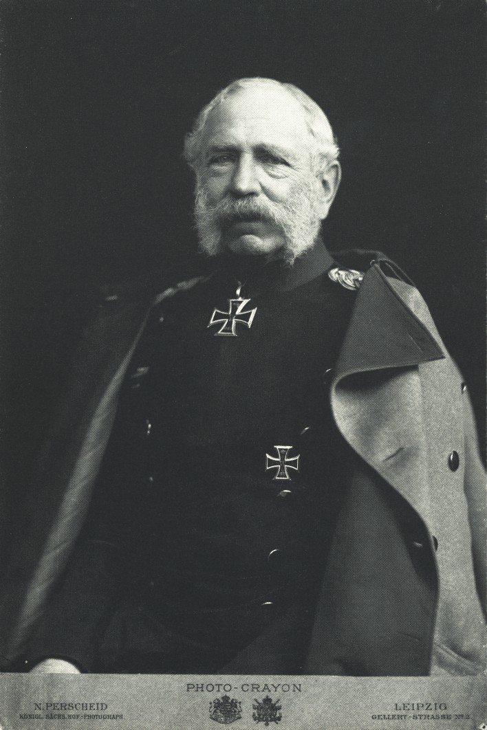 Porträt von König Albert von Sachsen (1828-1902).